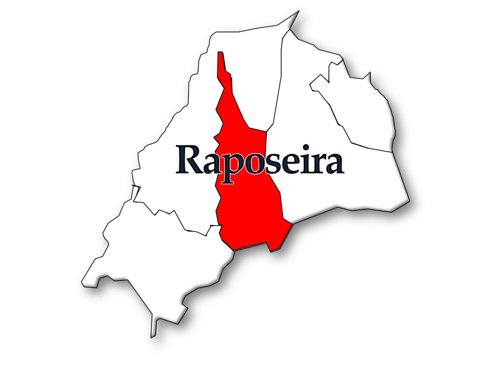 Censos 1864/2011